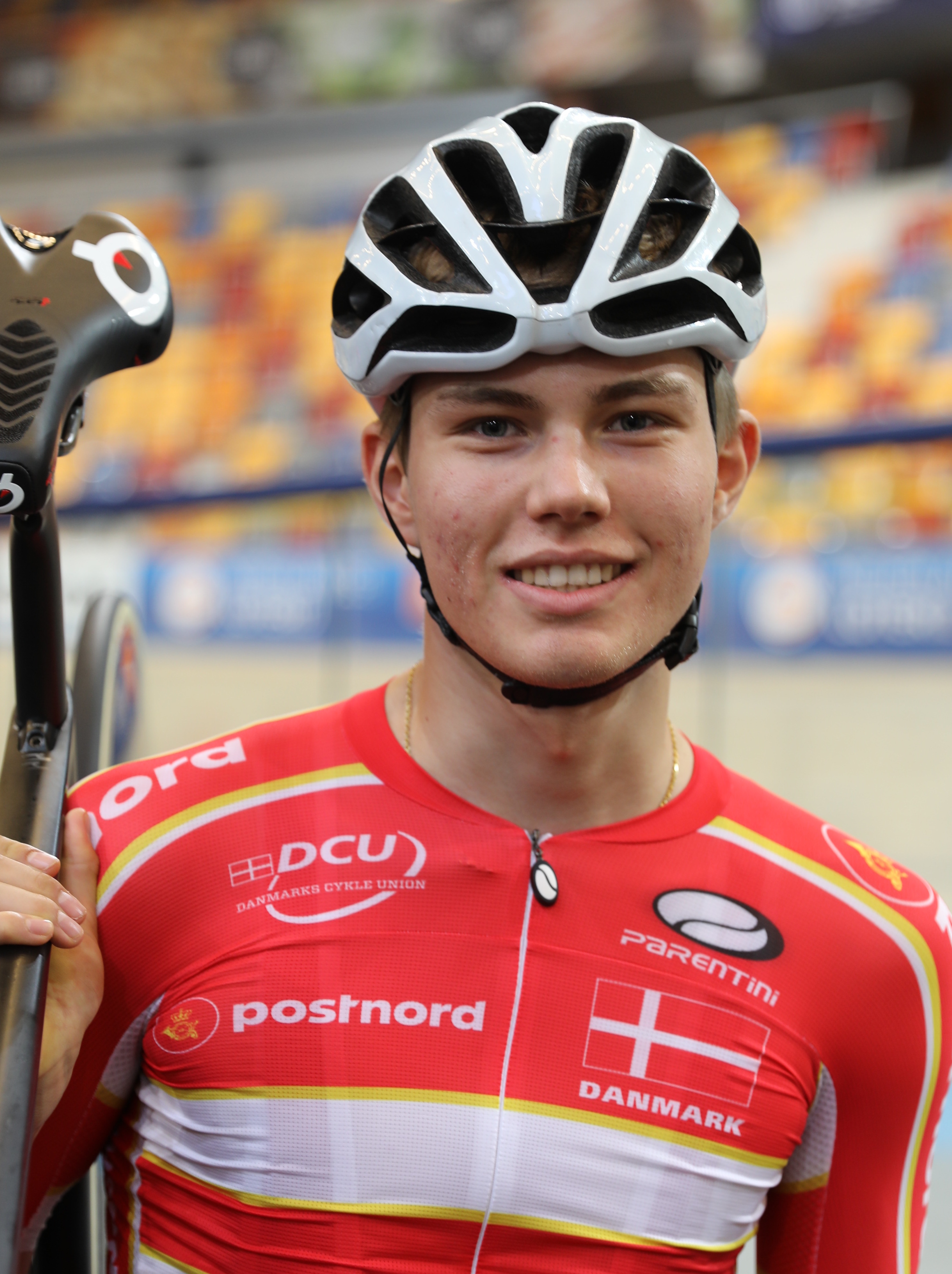 Matias Malmberg, dänischer Radsportler